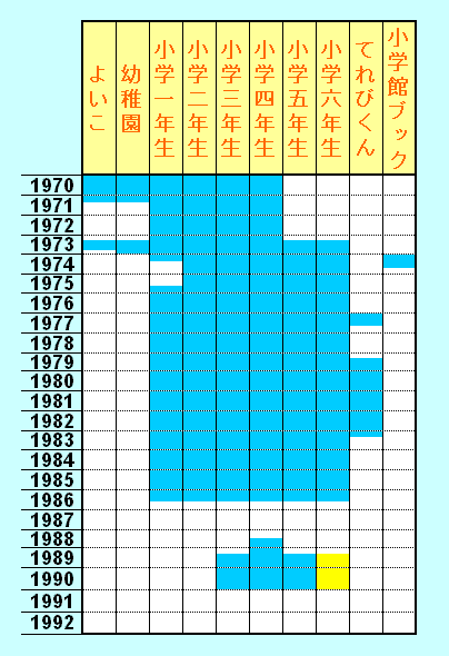 『ドラえもん』短編連載雑誌およびその期間。 ただし短期間の連載は除く。黄色は他誌との同時連載。(GIF)